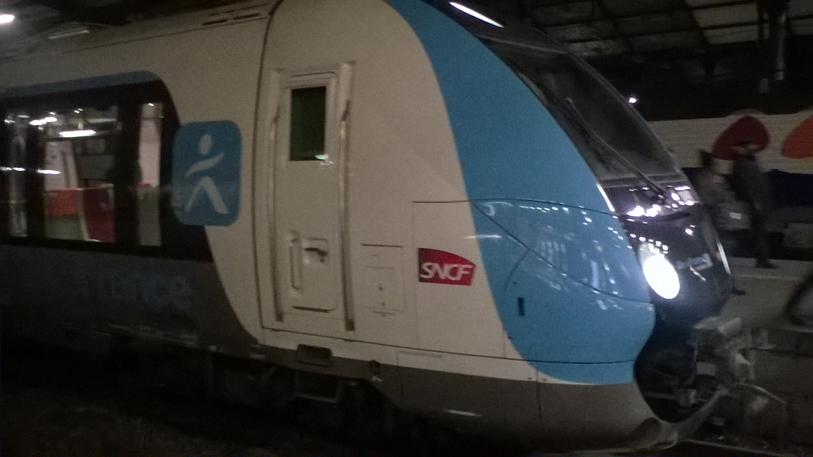 Rame Z 50000, avec livrée Île-de-France Mobilités.